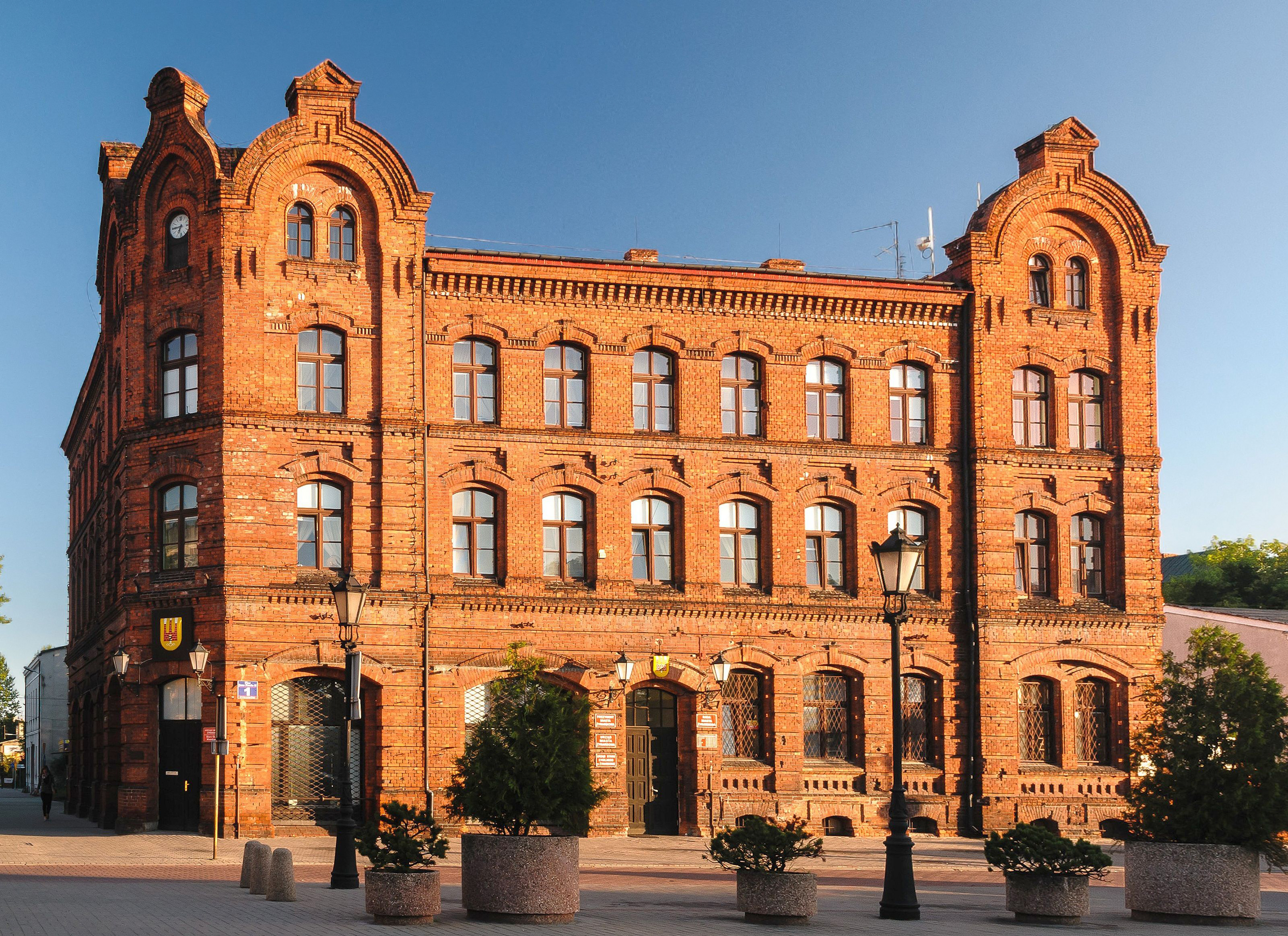 dom, pl. Wolności 1, 2 poł. XIX Żyrardów, Żyrardów 05.1975.